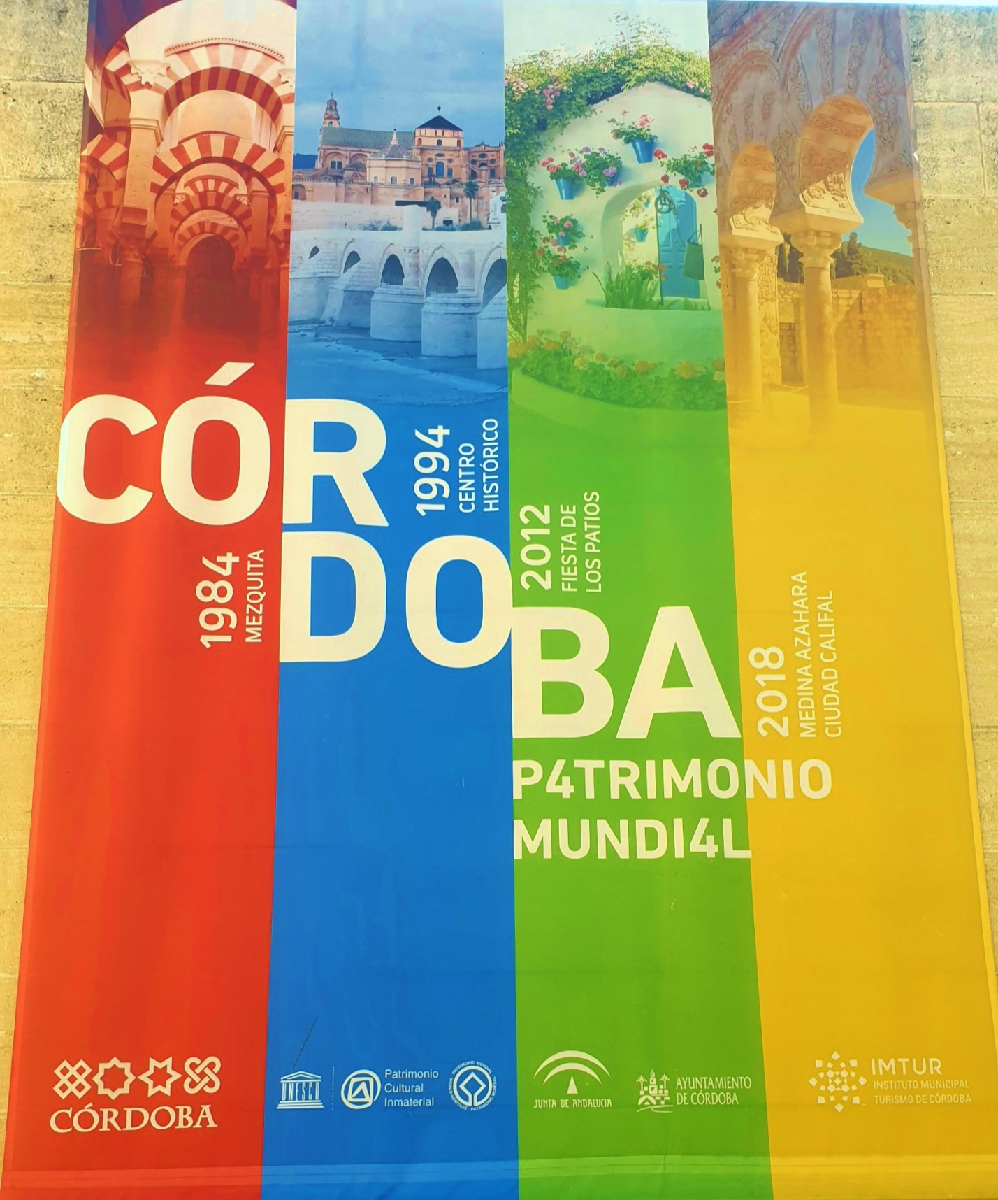 Córdoba y sus cuatro declaraciones de Patrimonio de la Humanidad.